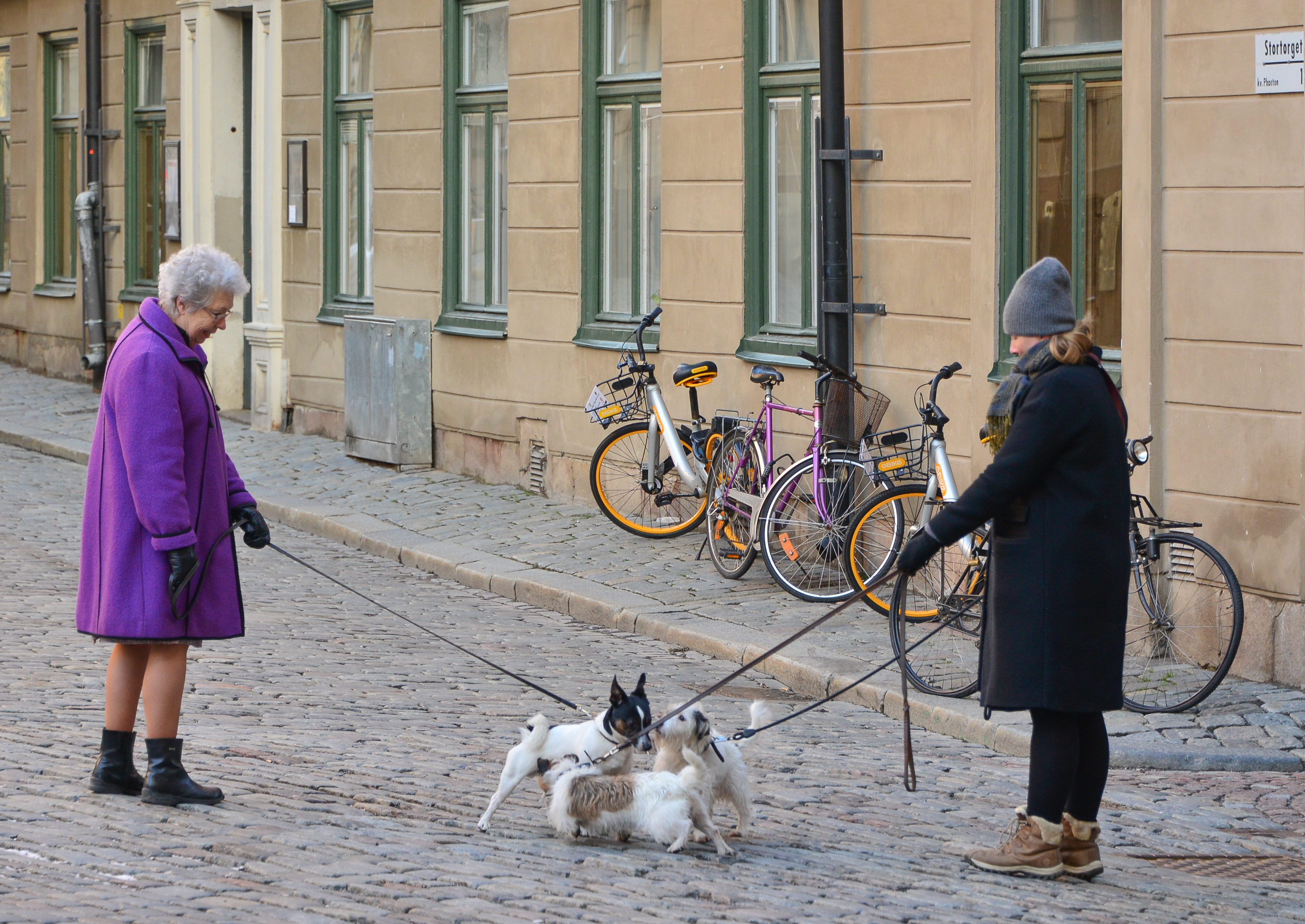 Prinsessan Christina rastar hunden i Gamla stan i Stockholm den 30 januari 2018.